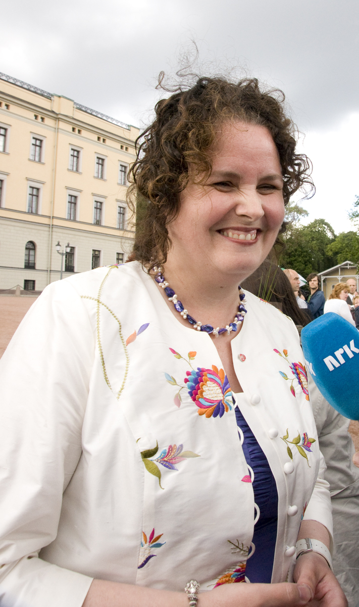 Sylvia Brustad at the Norwegian Castle